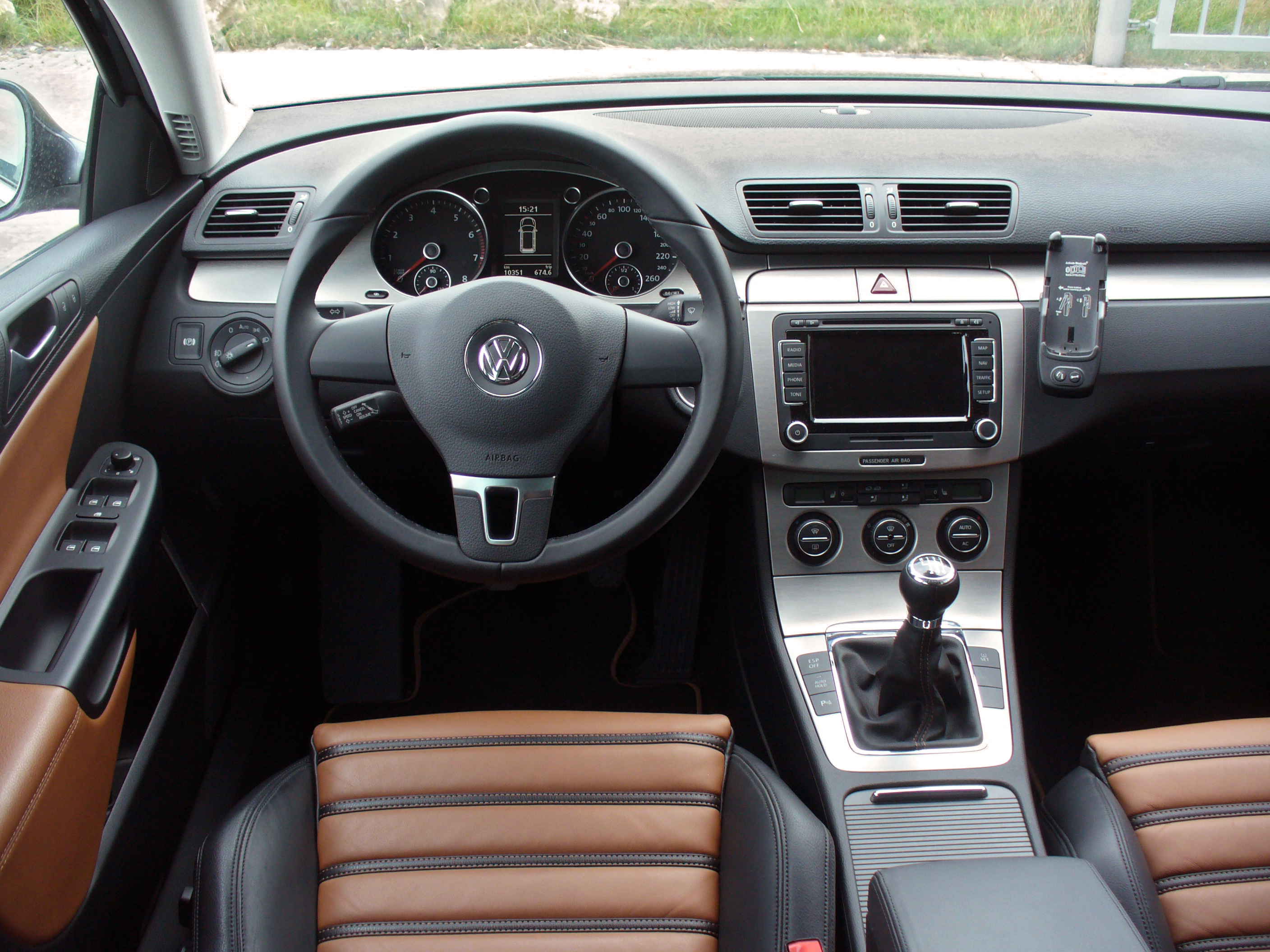 VW Passat Variant